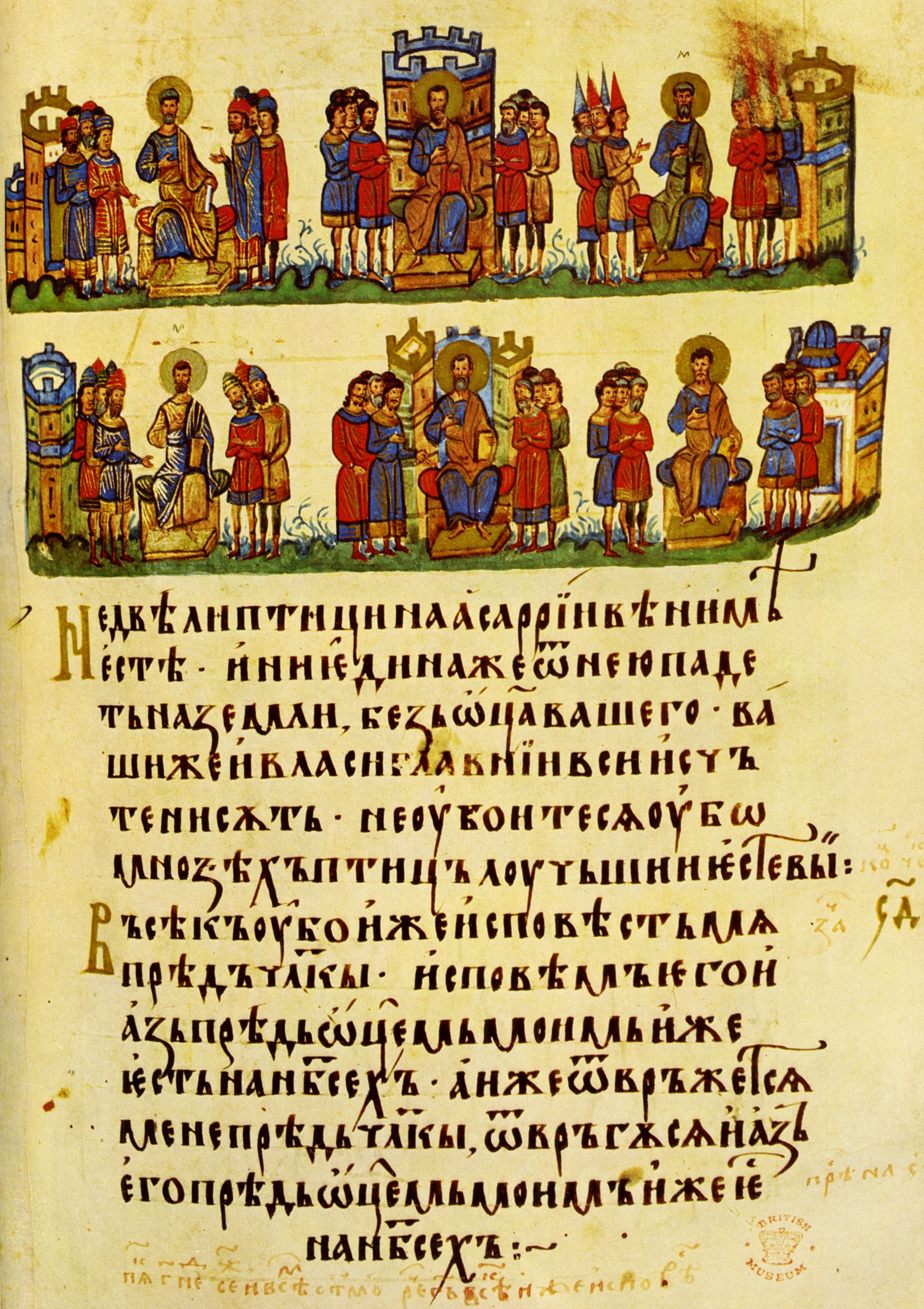 Четвероевангелие на цар Иван Александър, л. 32 Миниатюри: Исус проповядва (горе и долу)